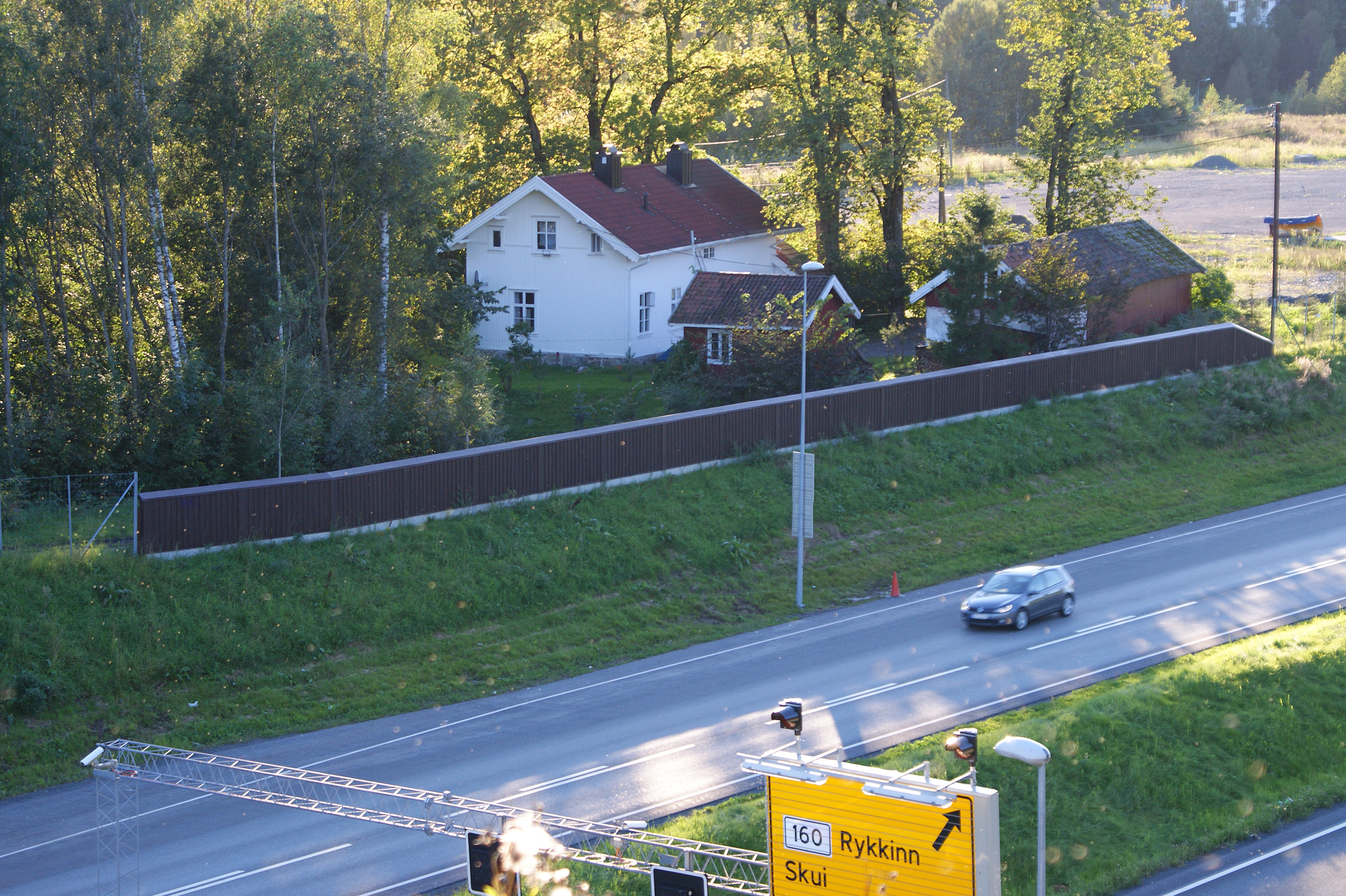 Økri skole var en av de første faste skolene i Bærum. Innviet 1866. Nedlagt 1901 da Skui skole stod klar. Bildet er tatt i 2011